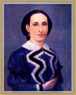 Madre de José de San Martín